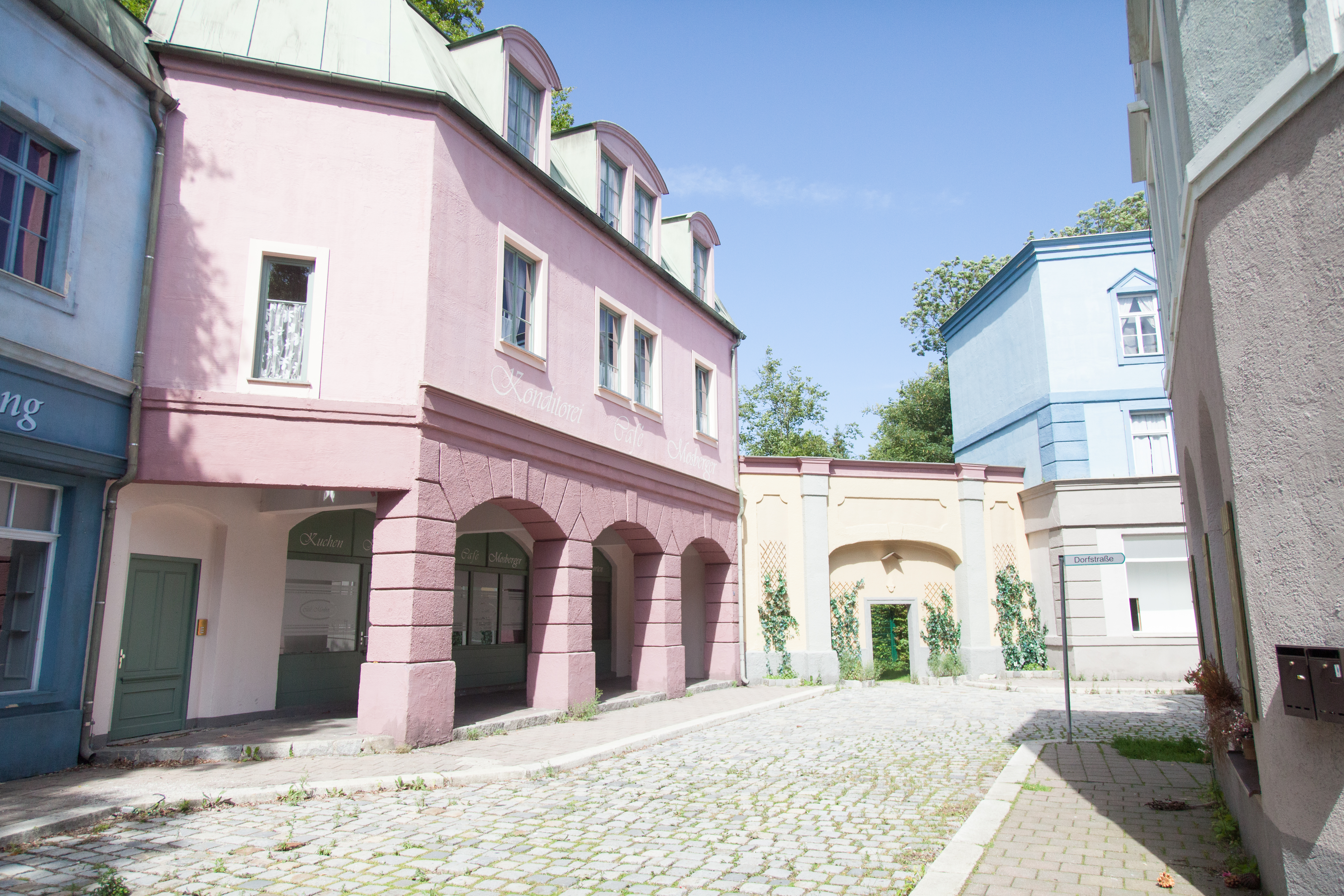 Bavaria Filmstadt Landtagsprojekt Bayern 17. bis 19. Juli 2012 in München Dieses Foto wurde im Rahmen des Projektes „Wikipedia im Landtag“ erstellt.